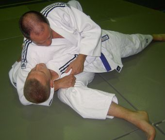 makura kesa gatame